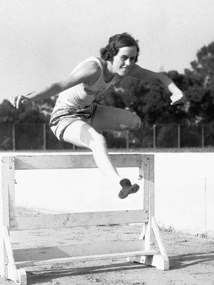 Alda Wilson, championne canadienne de course de haies, franchissant un obstacle lors d'un entraînement aux Jeux Olympiques à Los Angeles, Californie, Etats-Unis le 27 juillet 1932.